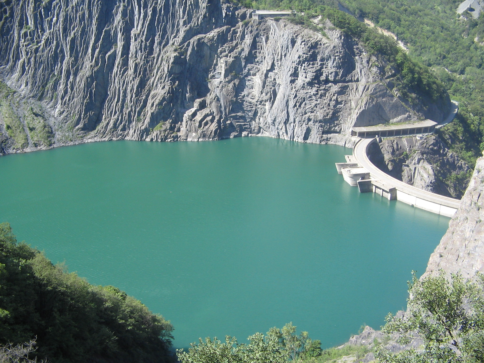 Lac et barrage de Monteynard, département de l'Isère